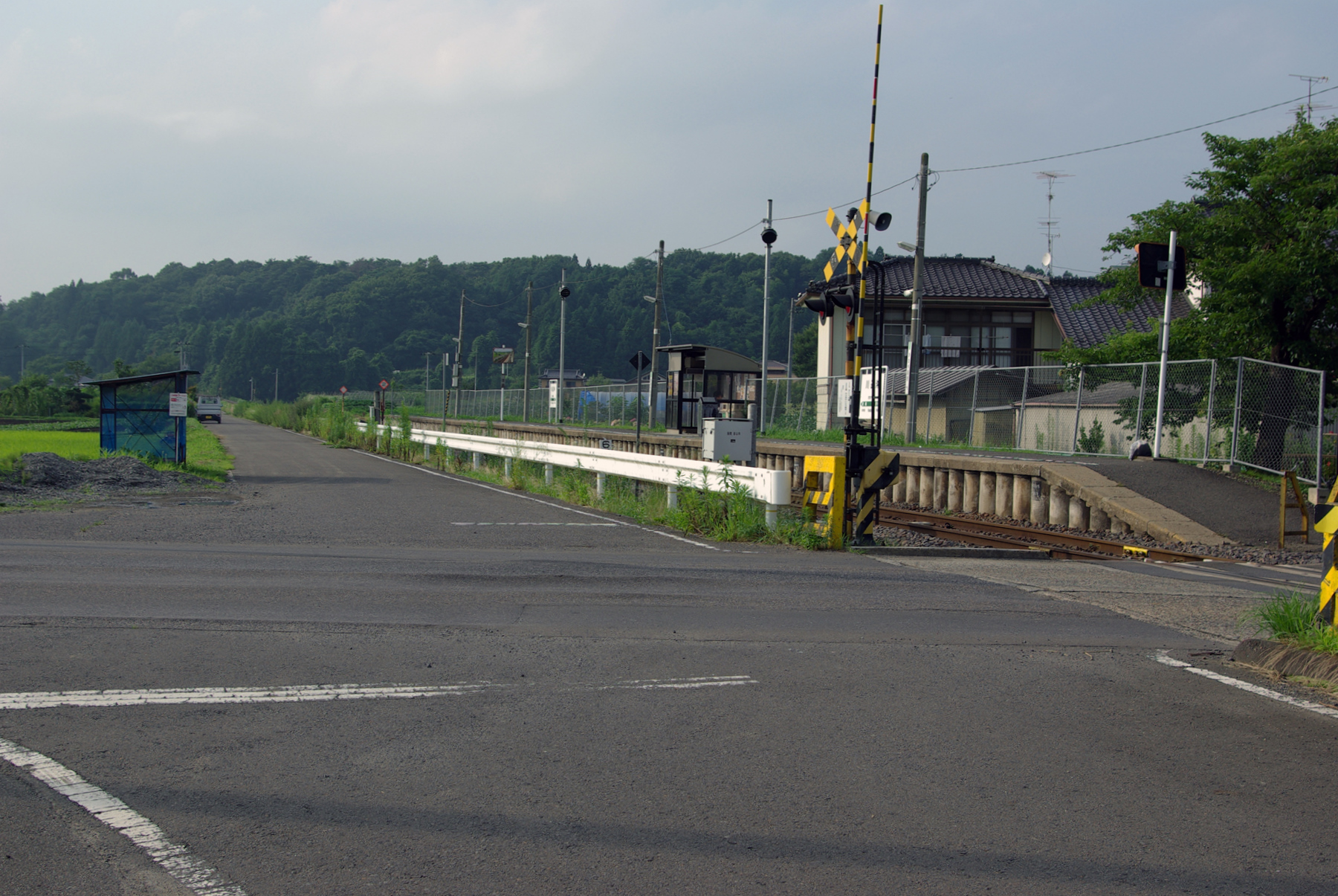 JR水郡線川辺沖駅